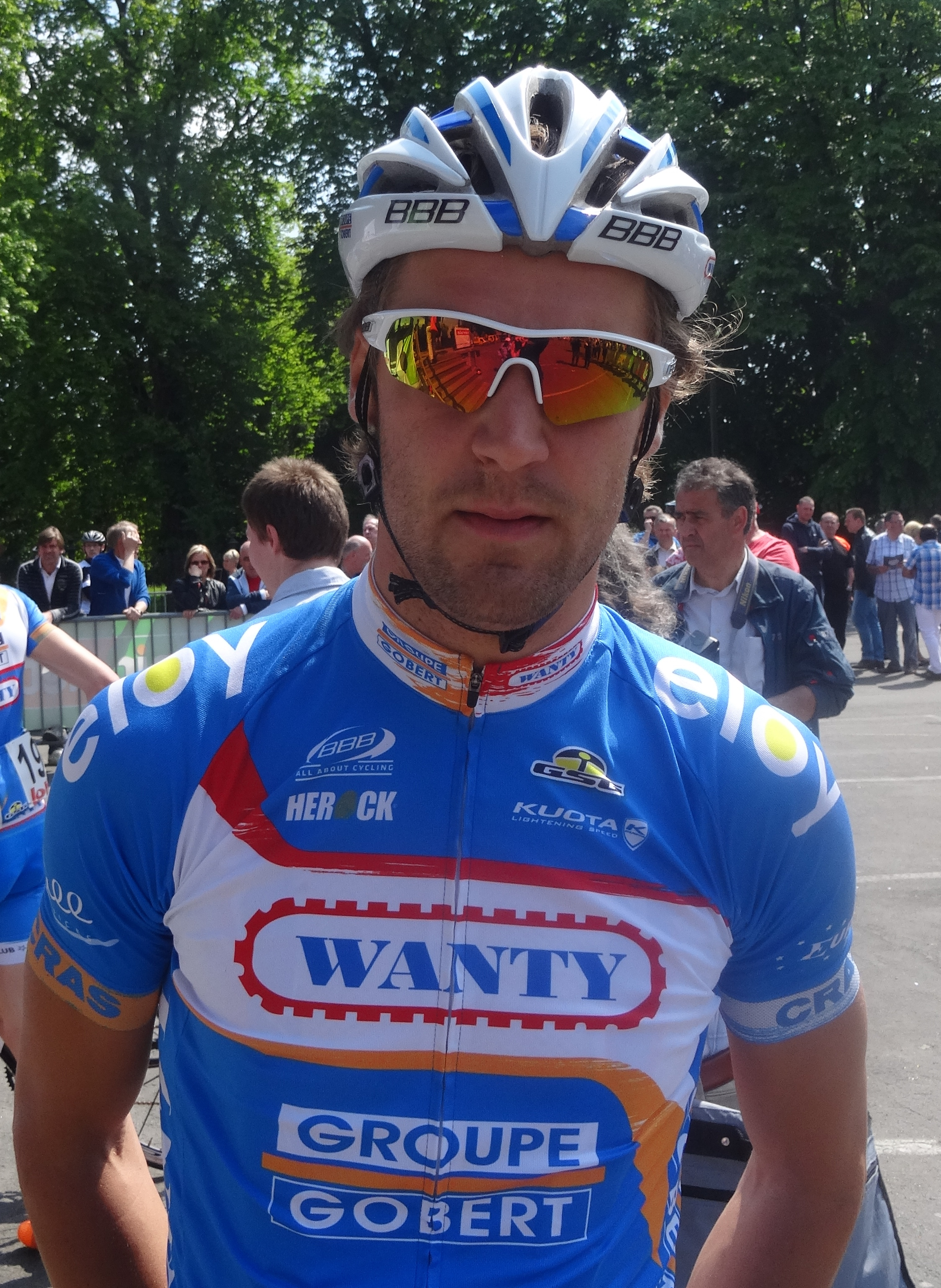 Reportage réalisé le samedi 17 mai à l'occasion du départ du Grand Prix Criquielion 2014 à Boussu, Belgique.